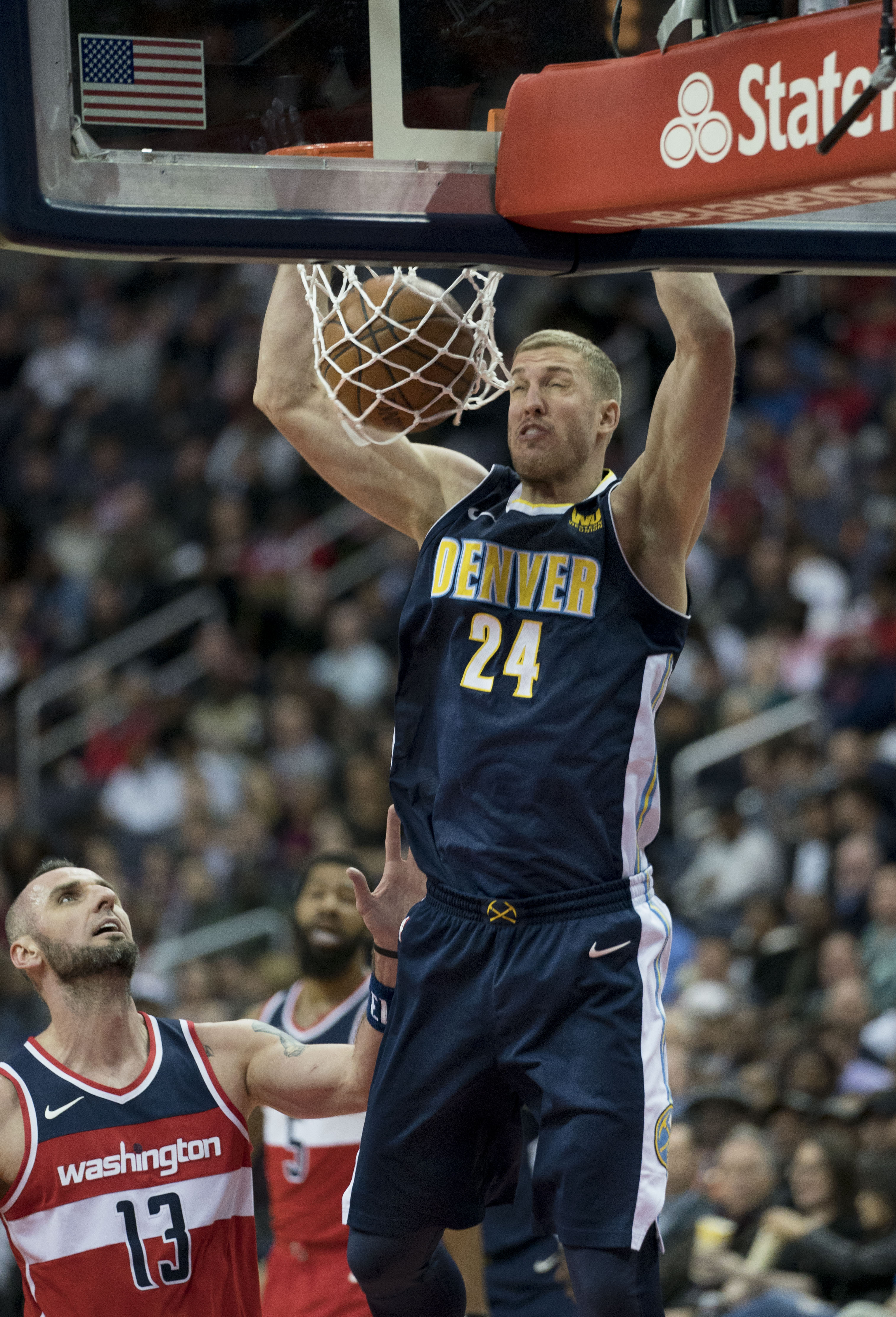 Nuggets at Wizards 3/23/18